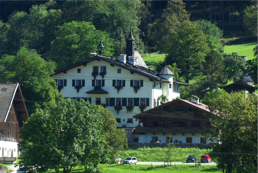 Schlossanlage, Schloss Kammer